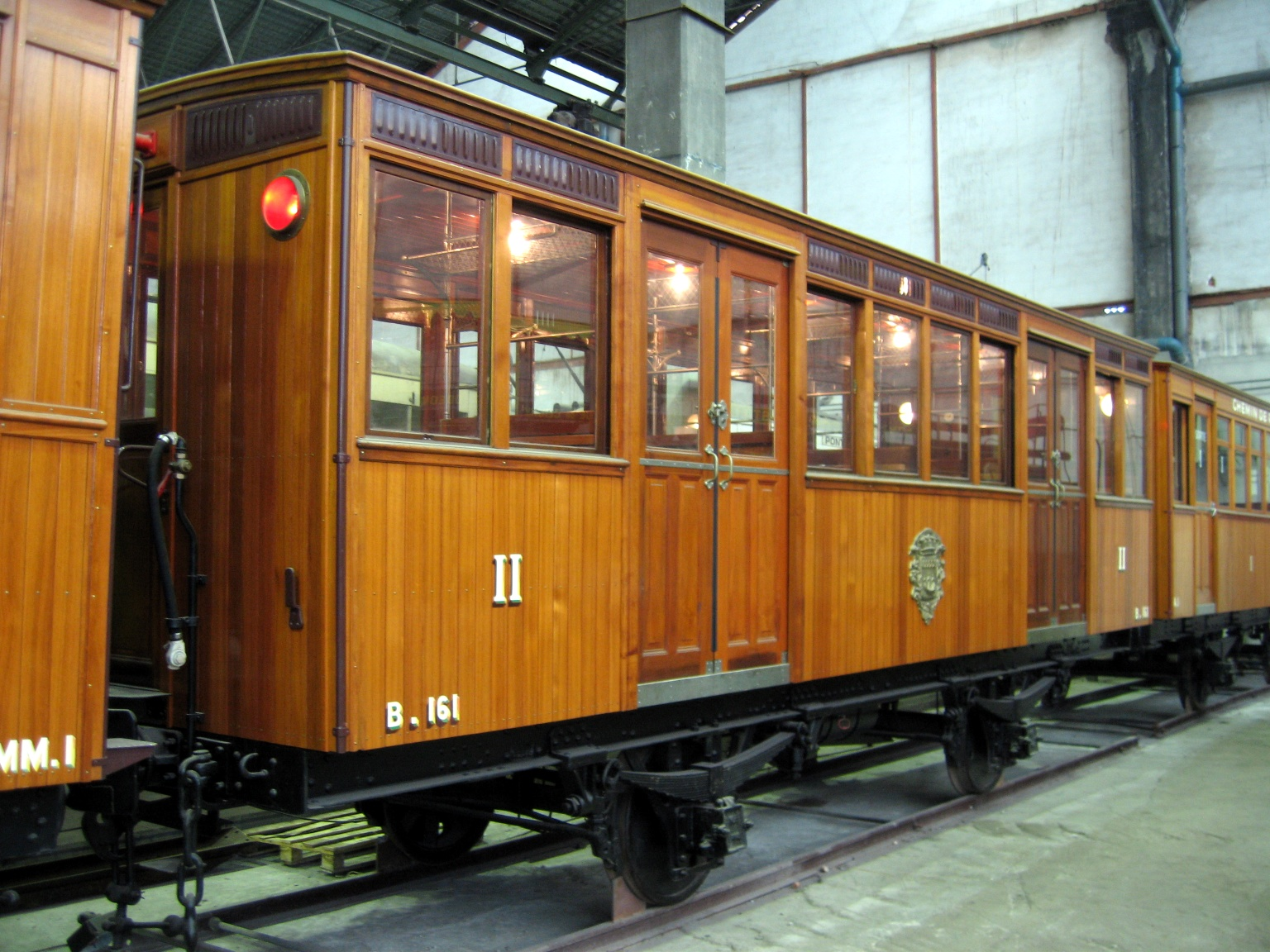 Remorque B 161Journées du patrimoine AMTUIR 15/09/2007.